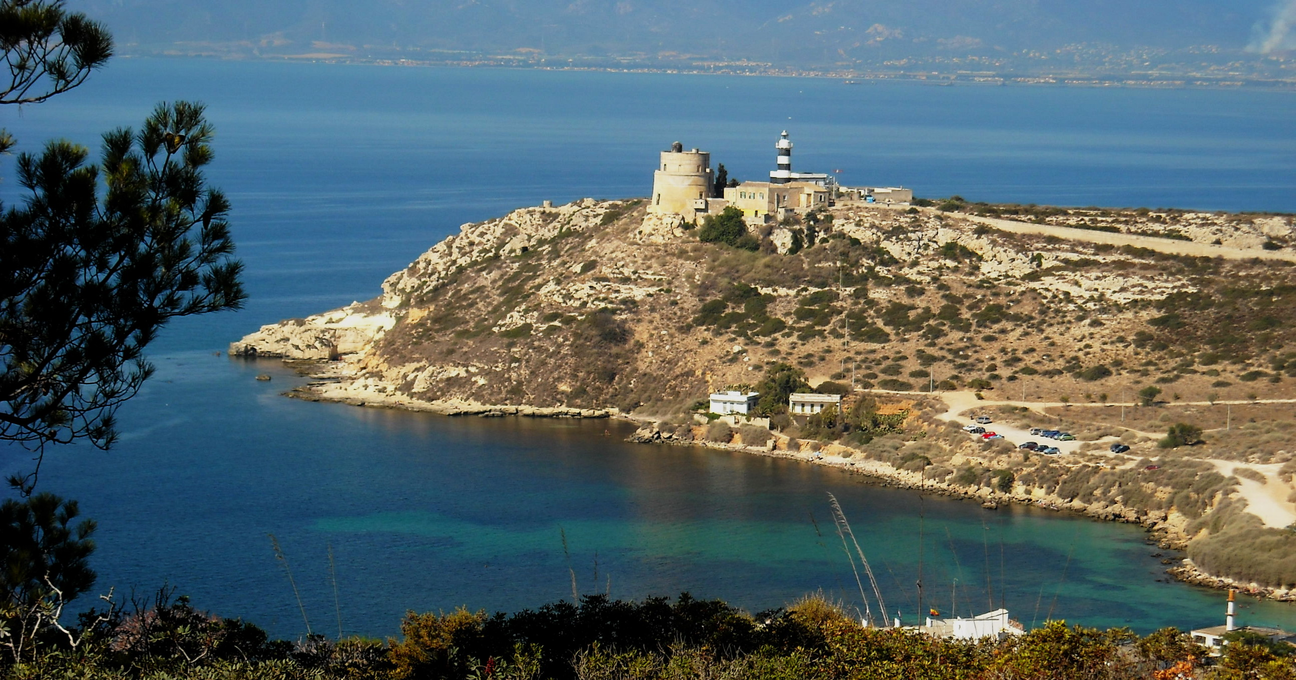 Capo Sant'Elia e Sella del Diavolo - Cagliari